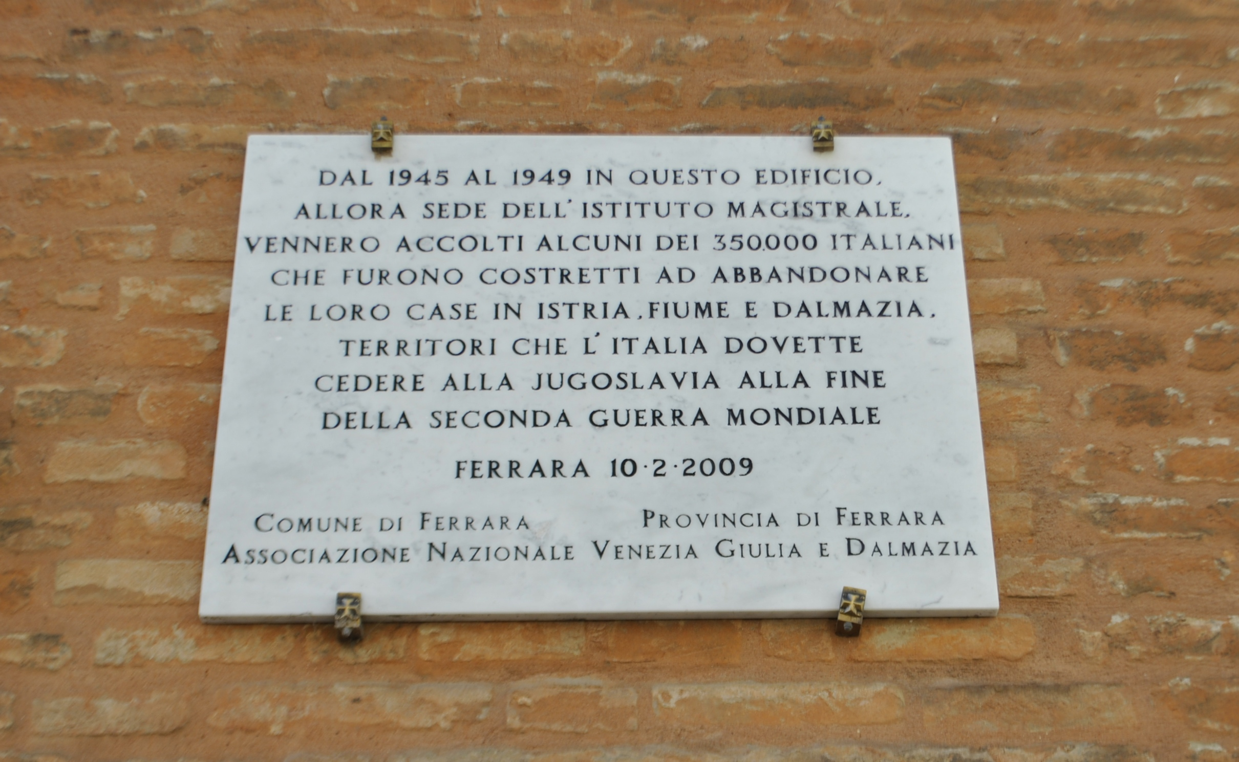 Targa, Palazzo Pendaglia - IPSSAR Orio Vergani via Romei 12, Ferrara This is a photo of a monument which is part of cultural heritage of Italy.